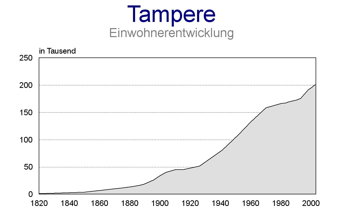 Entwicklung der Einwohnerzahl von Tampere